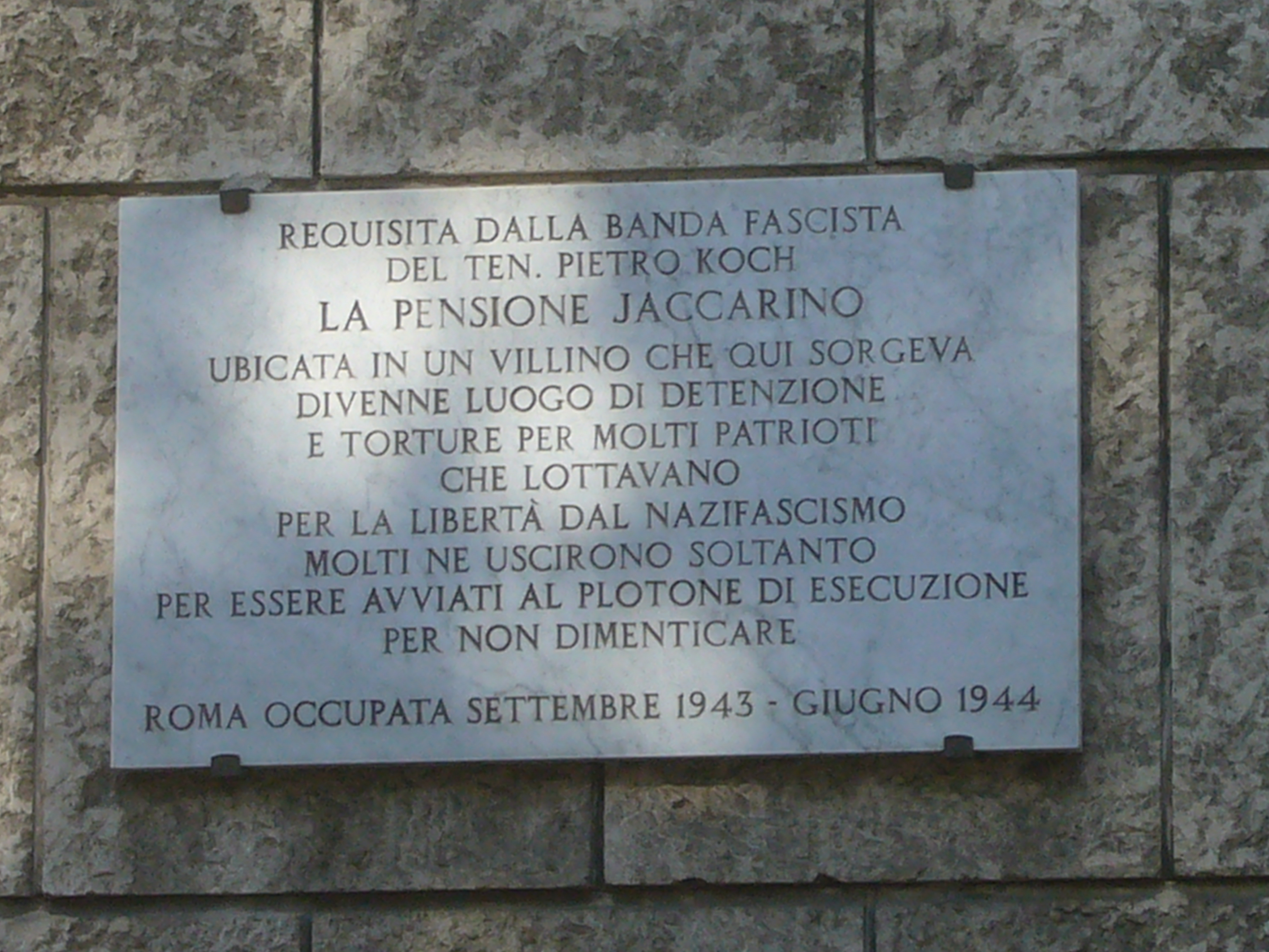 Roma, via Romagna. Memoria della pensione Jaccarino, dove la banda Koch (che aveva già operato a via Tasso con le SS) imprigionò e torturò, fra il 1943 e il 44 per conto di nazisti, fascisti e repubblichini, decine di persone. Il villino fu demolito e sostituito da una vasta cubatura moderna, ma sulla facciata fu applicata, in memoria della ferocia e della brutalità degli assassini, questa lapide.